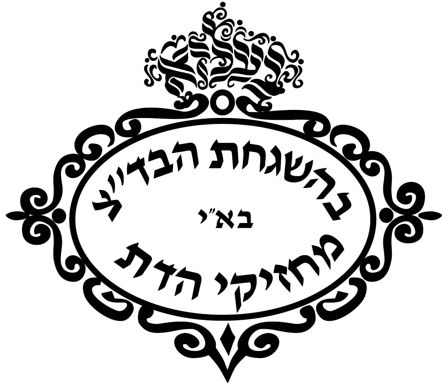 חותמת